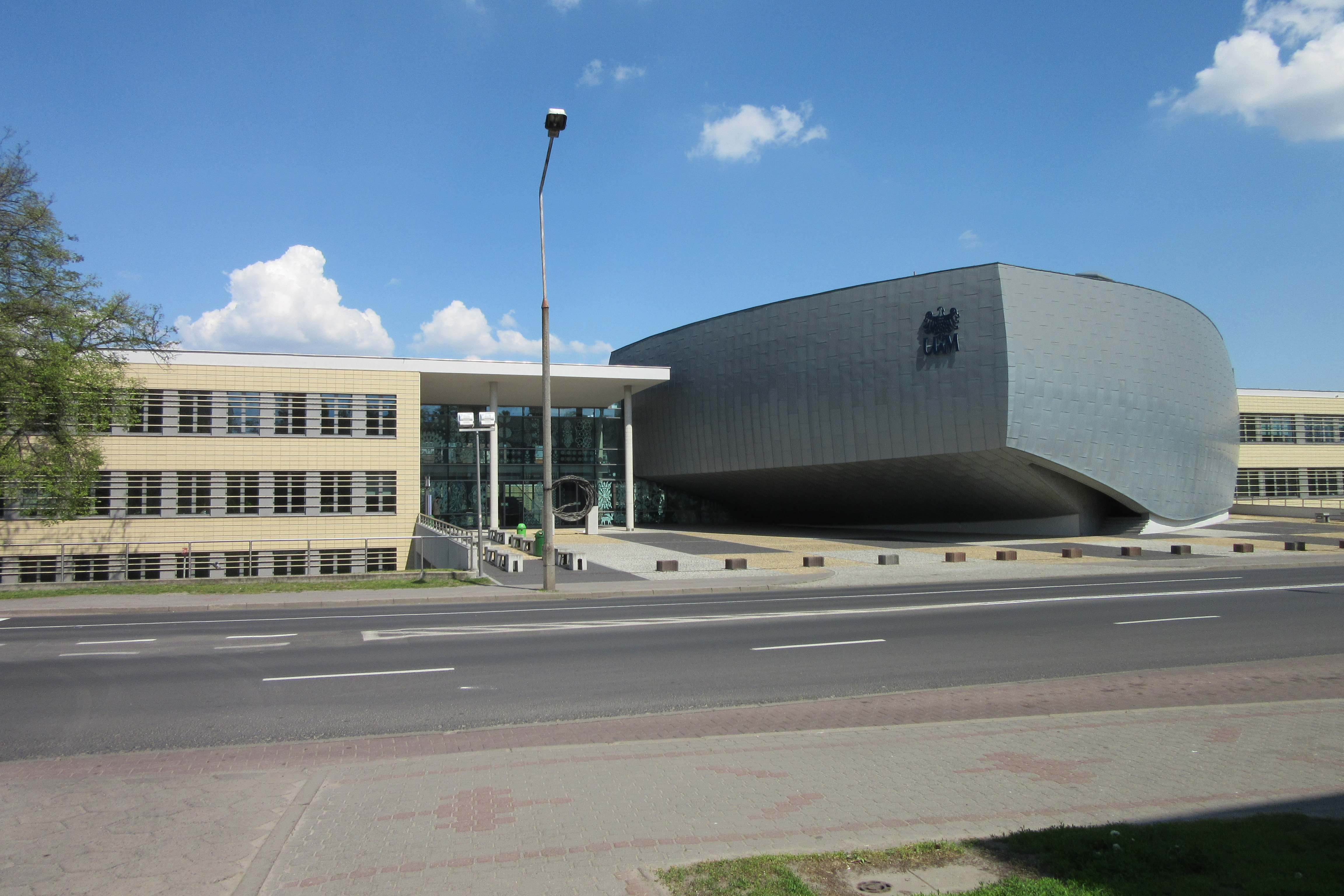 Wydział Pedagogiczno-Artystyczny w Kaliszu Uniwersytetu im. Adama Mickiewicza w Poznaniu